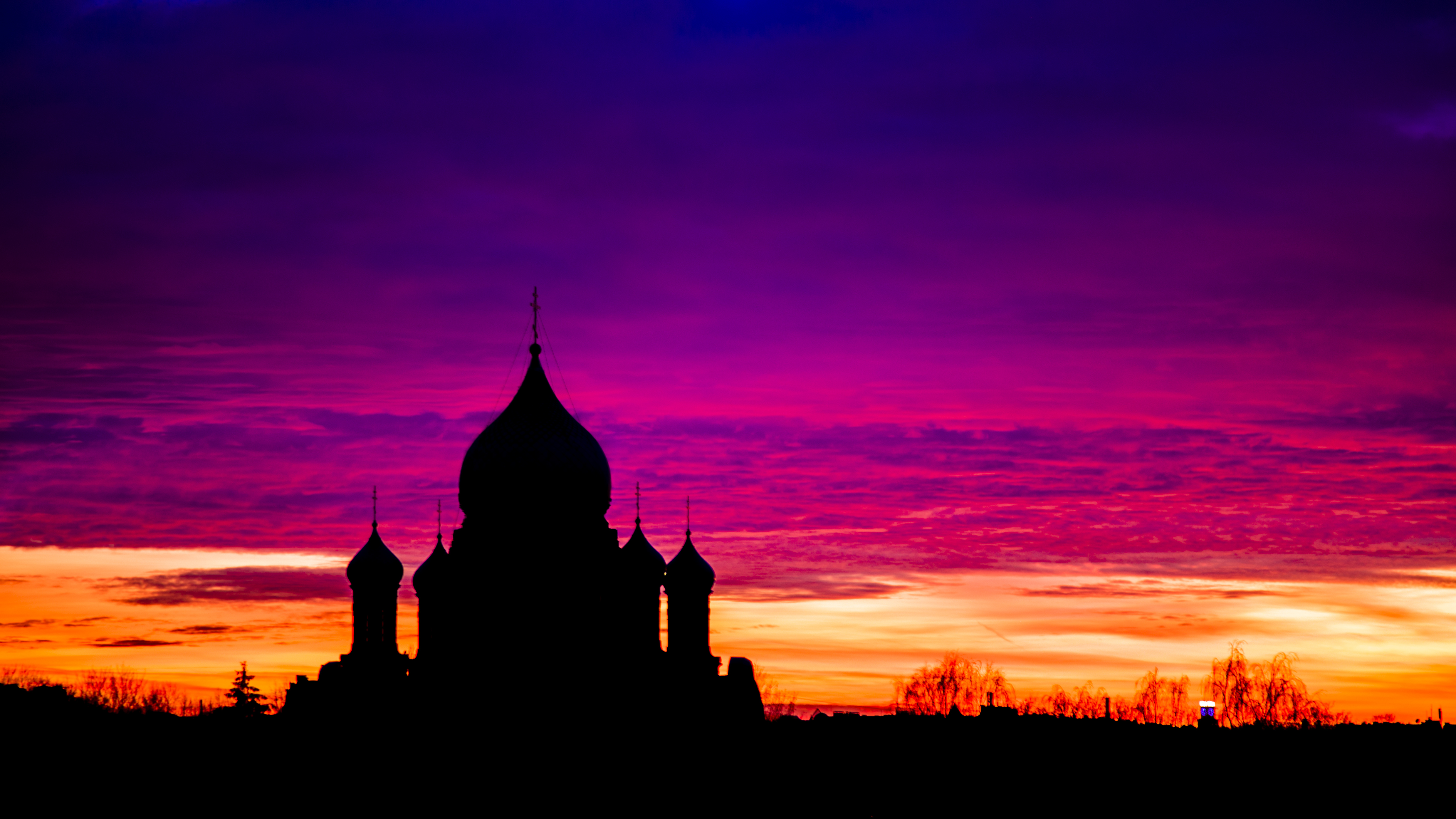 Силуэт Свято-Троицкого собора в Риге на закате